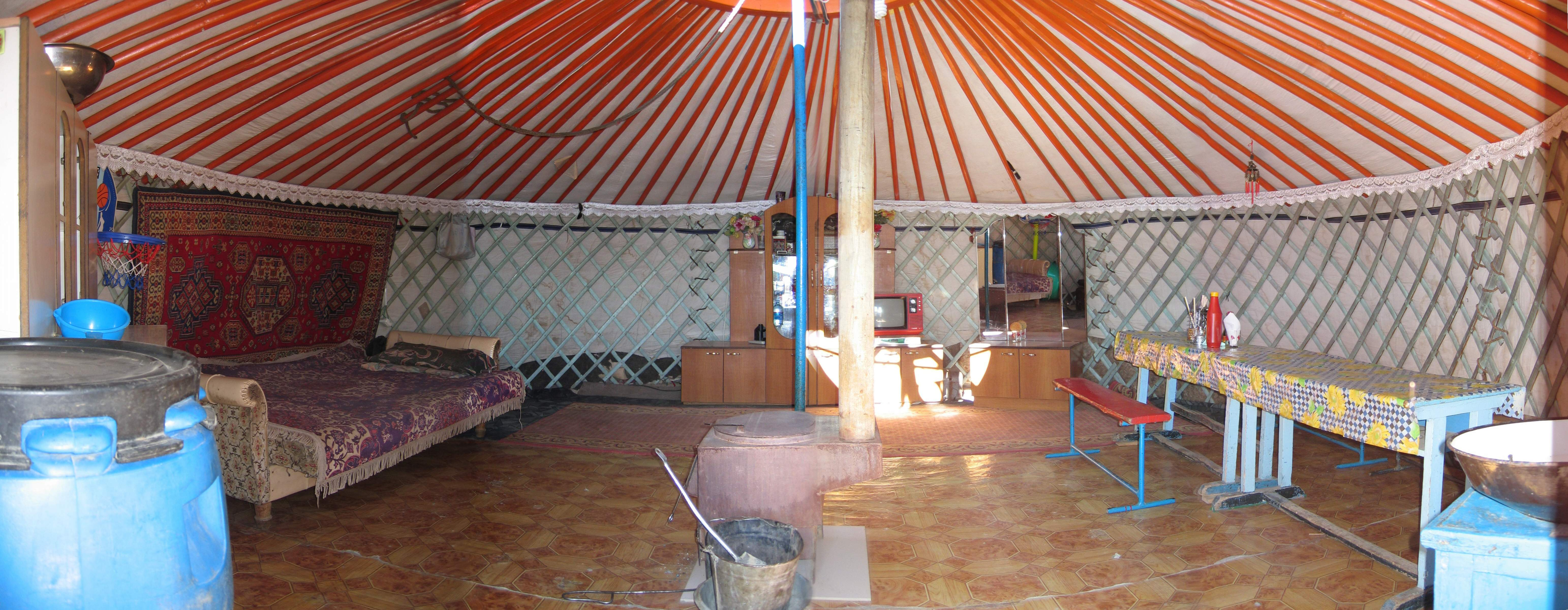 Intérieur d'un ger